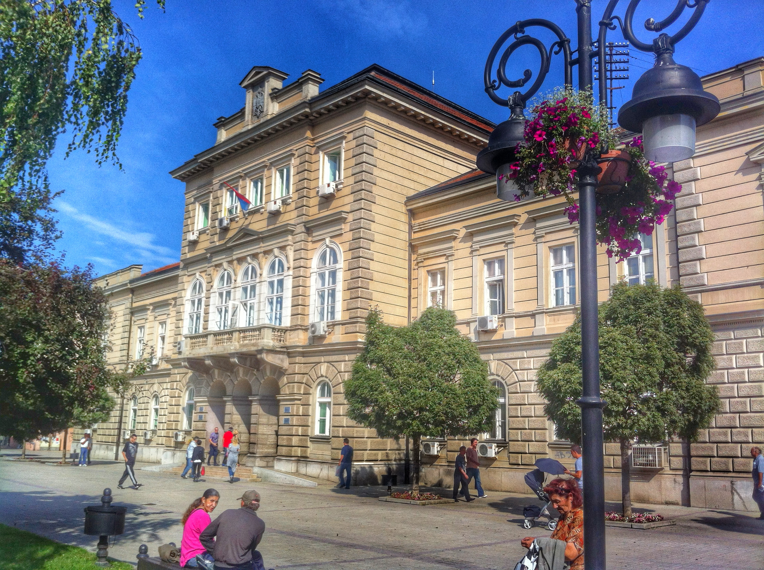 Српски (ћирилица): Зграда је саграђена 1888.године и била је Зграда Старог Начелства.